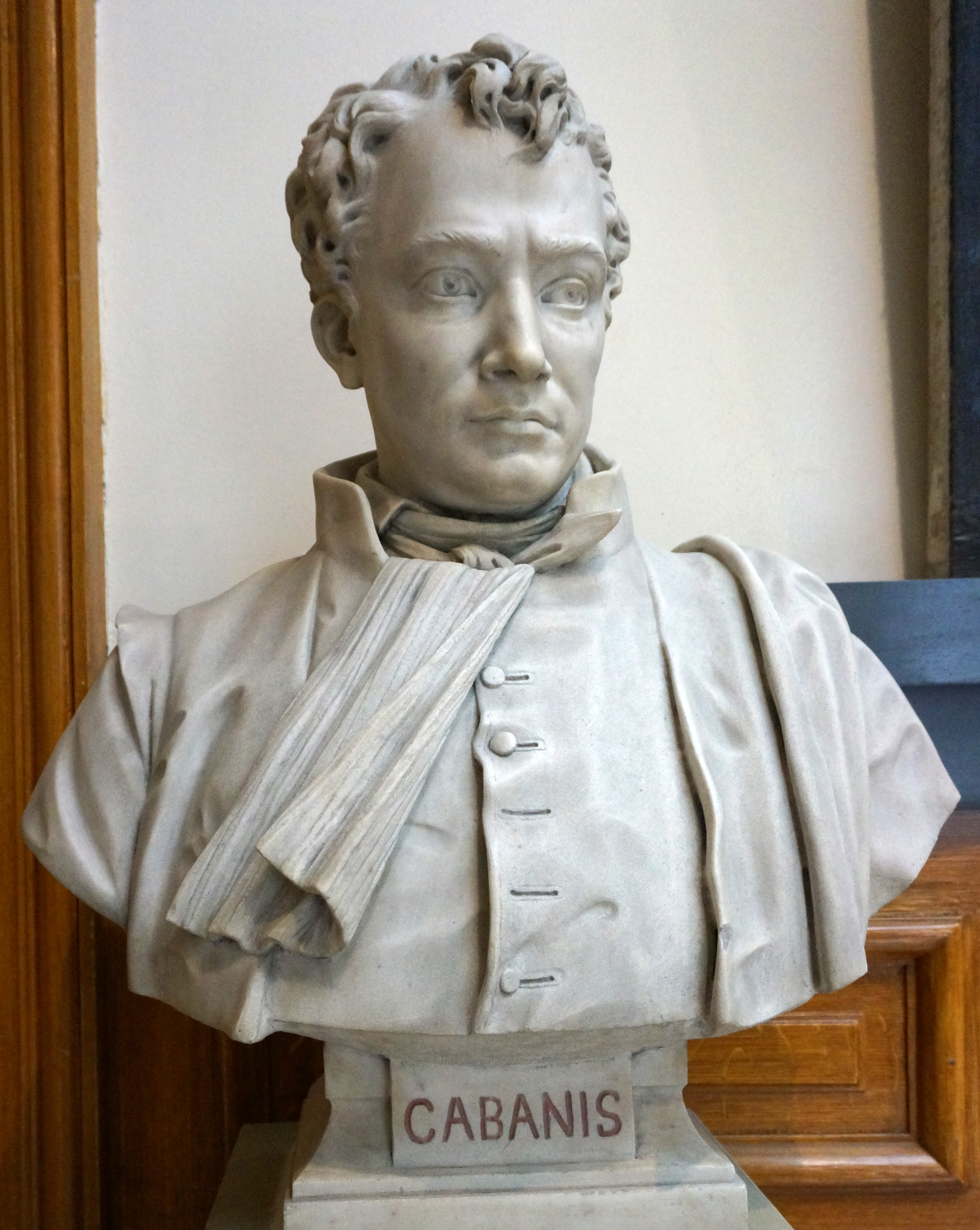 dans les couloirs qui menent au Musée d'histoire de la médecine.